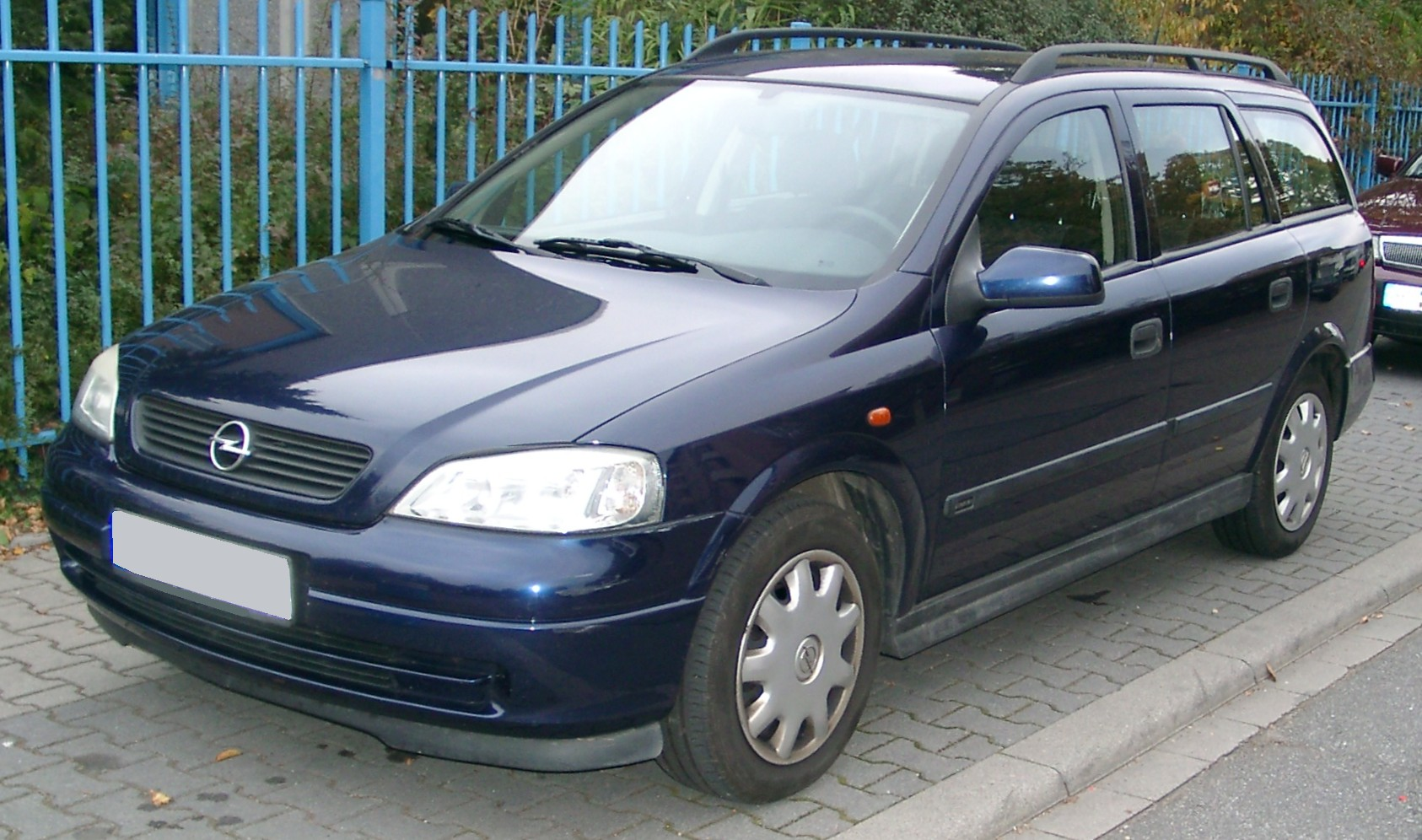 Opel Astra G Caravan